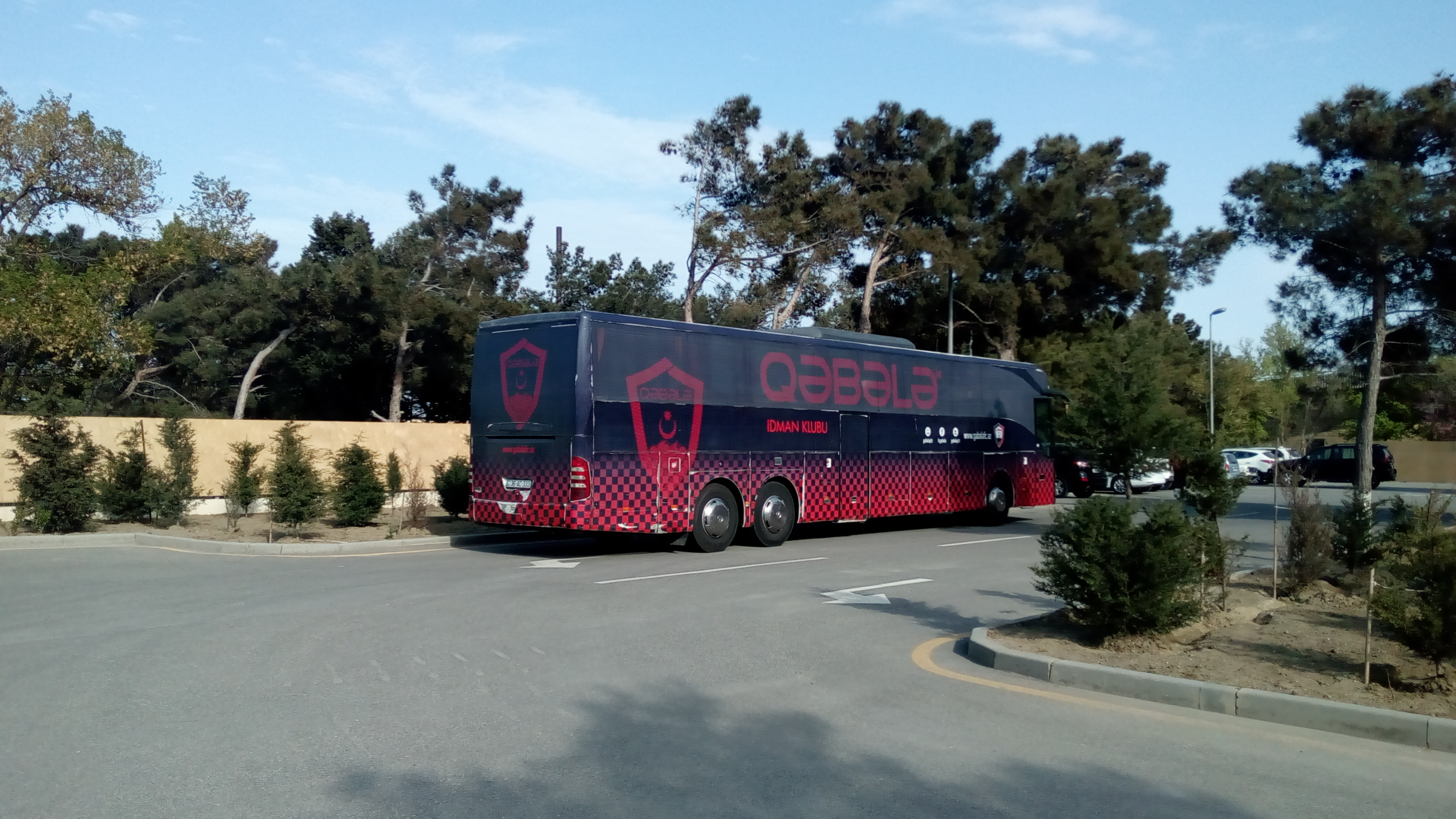 Sumqayıt - Qəbələ, 29.04.2017